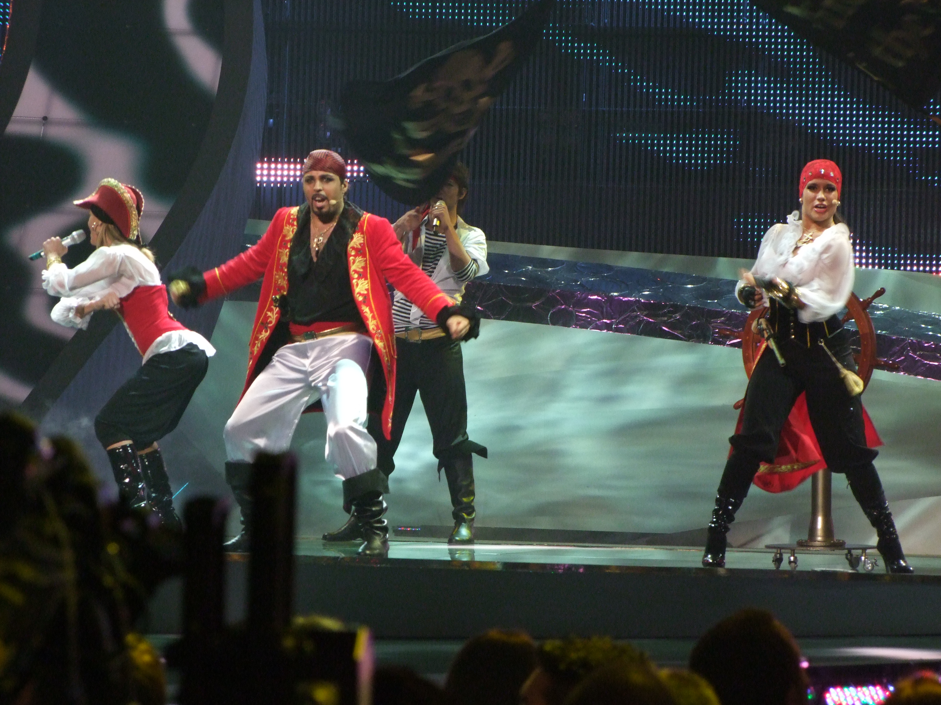 Final Eurovision 2008